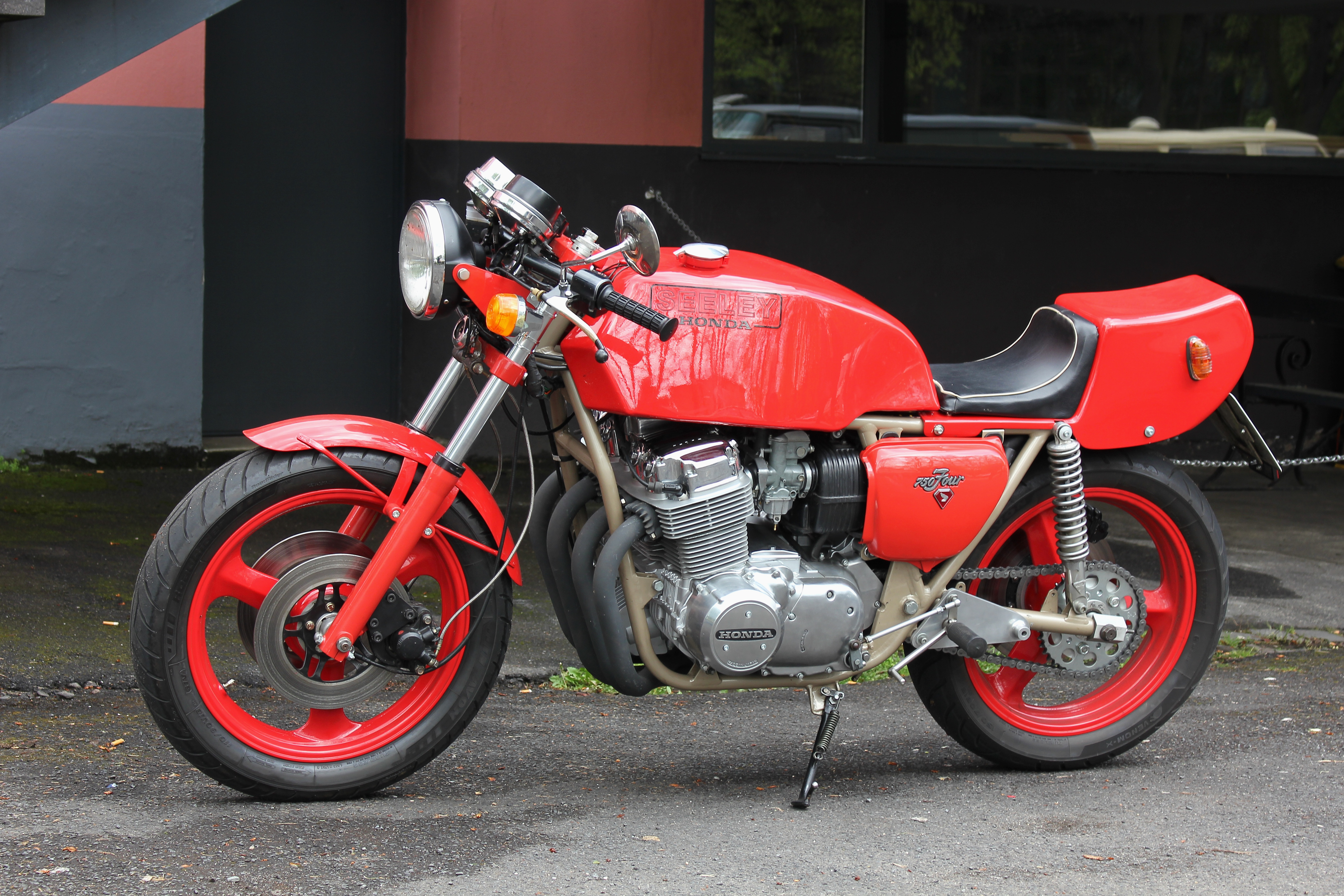 Seeley-Honda 750 four, Baujahr 1977, gebaut aus einem von dem früheren Rennfahrer Colin Seeley konstruierten Rahmen und Originalteilen von Honda: 4-Zylinder-Motor, 736 cm³, 67 PS bei 8000/min, Gewicht 210 kg, Höchstgeschwindigkeit über 200 km/h